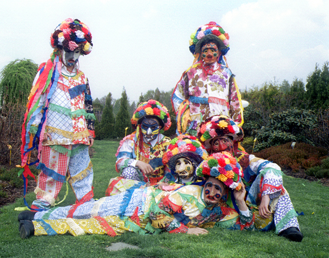 Regionalny Zespoł Pieśni i Tańca "Cepelia Fil Wilamowice"